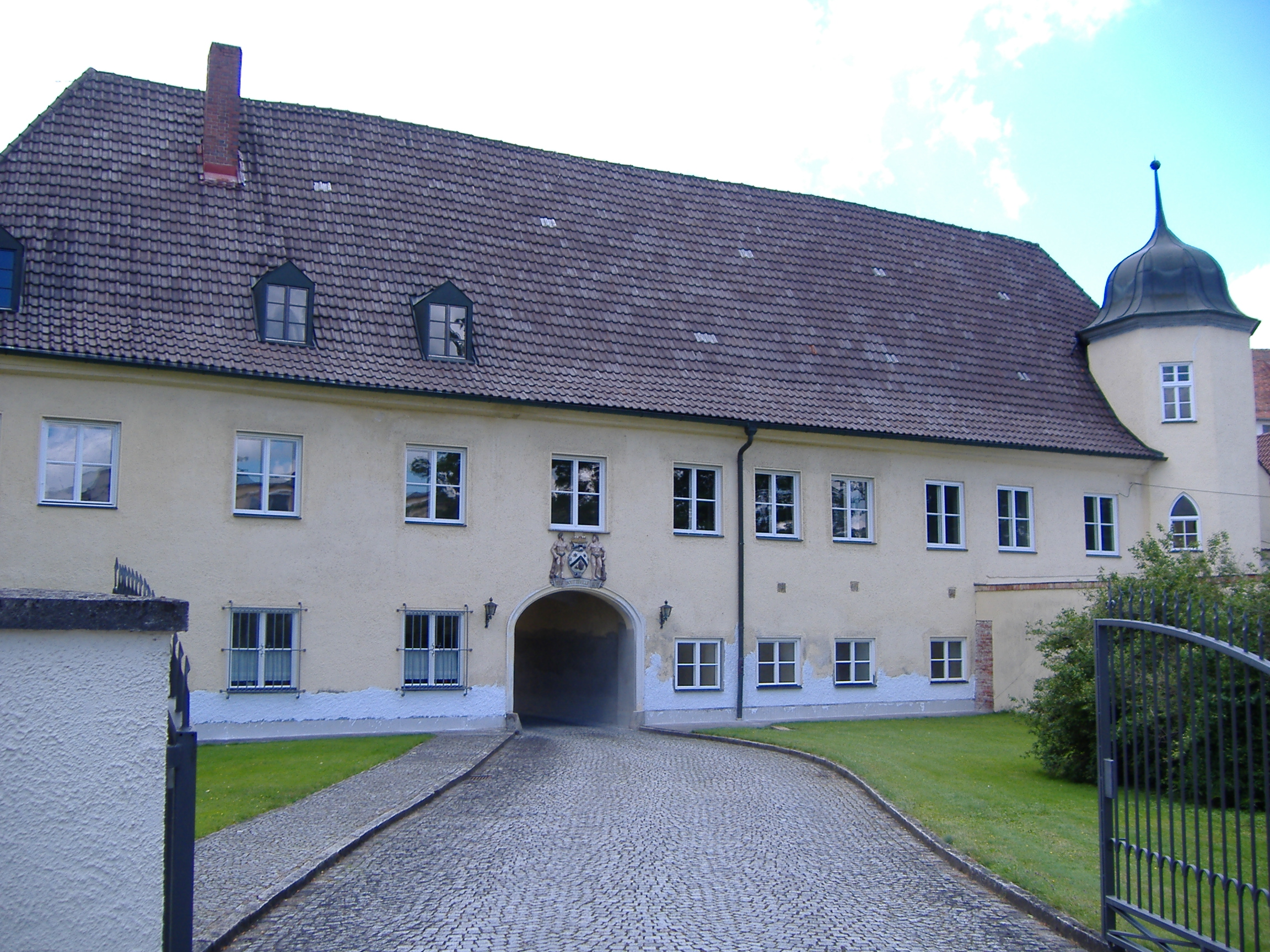 Vorderfront Schloss Mering